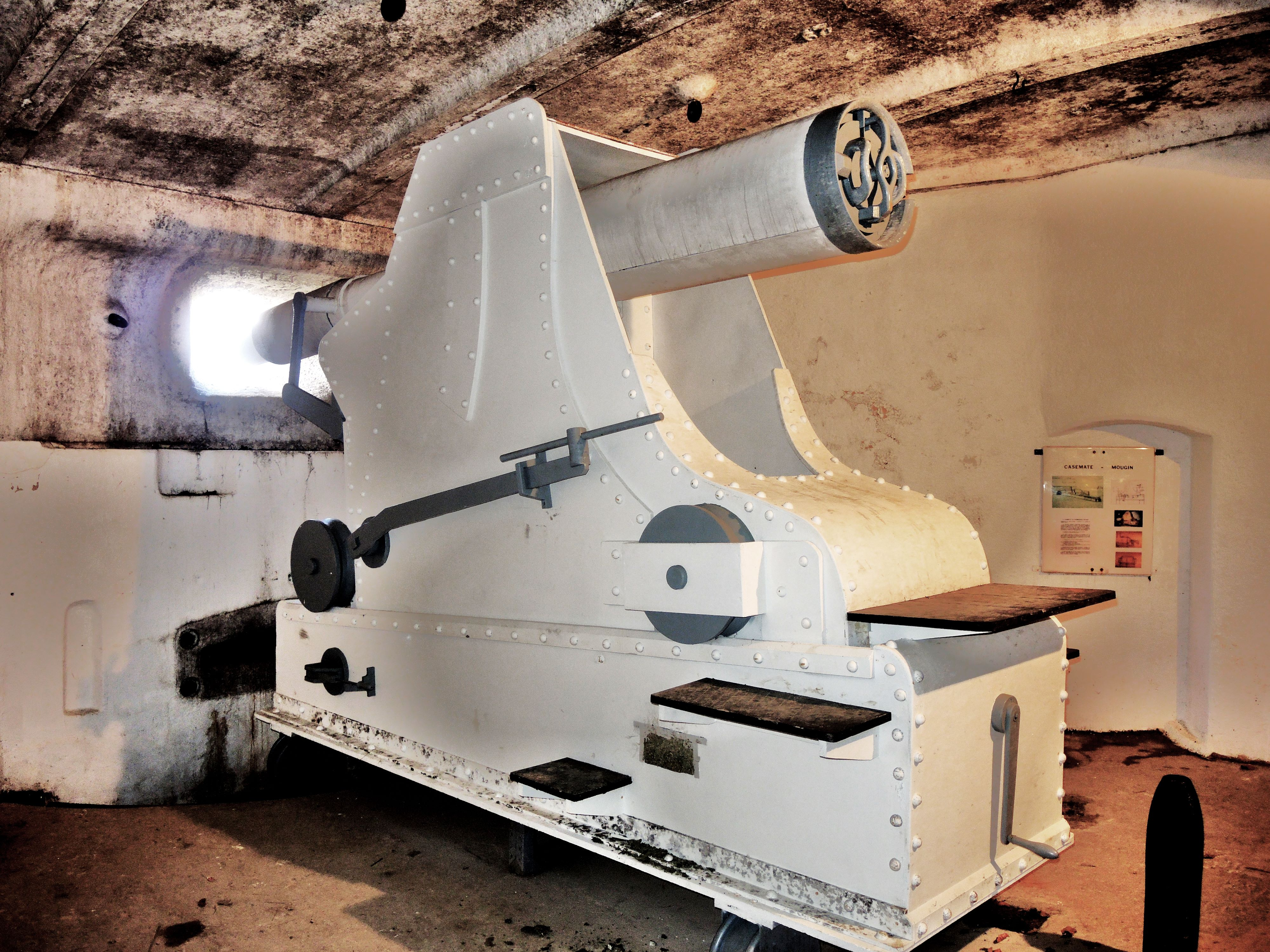 Maquette du canon de Bange, de 155, dans la casemate cuirassée du commandant Mougin. Fort du mont Bart. Bart. Doubs